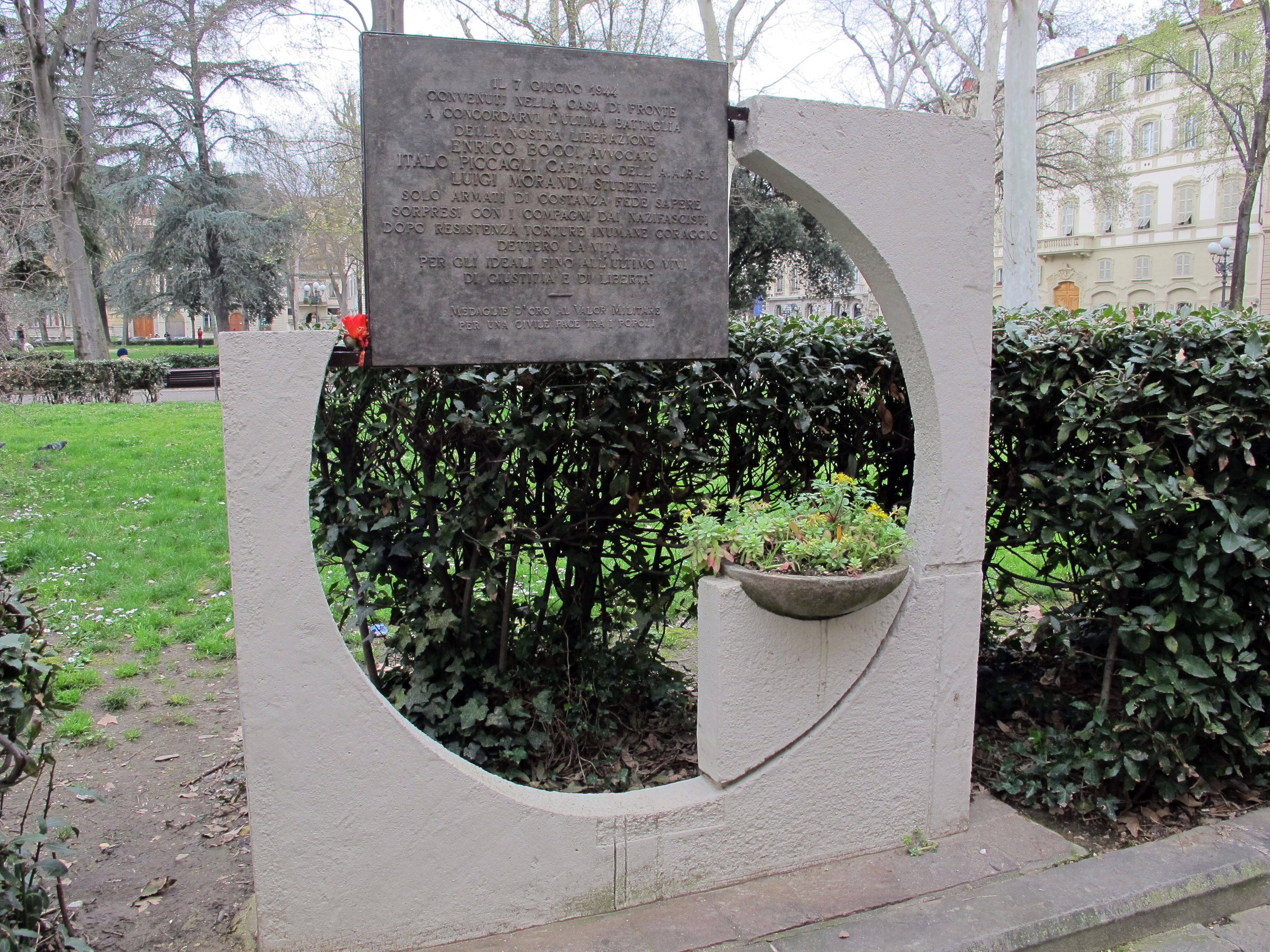 Piazza d'azeglio, parco, monumento